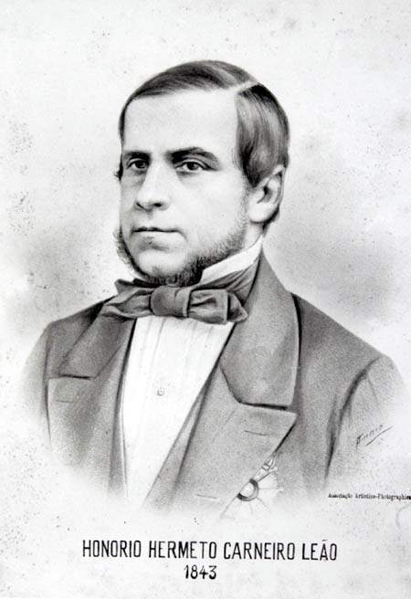 Honório Hermeto Carneiro Leão, o Marquês de Paraná.